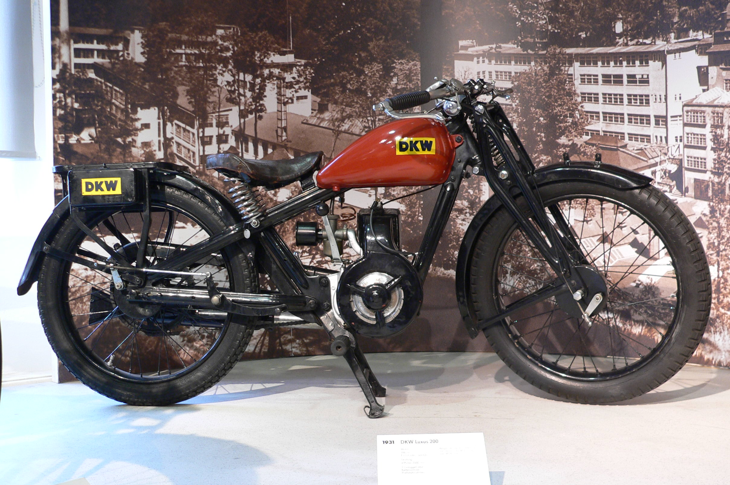 Motorbike "DKW Luxus 200" (1931) at the Deutsches Zweirad- und NSU-Museum (198 cm³, Einzylinder-Zweitakt-Motor, 4 PS bei 3.500 U/min., 70 km/h)